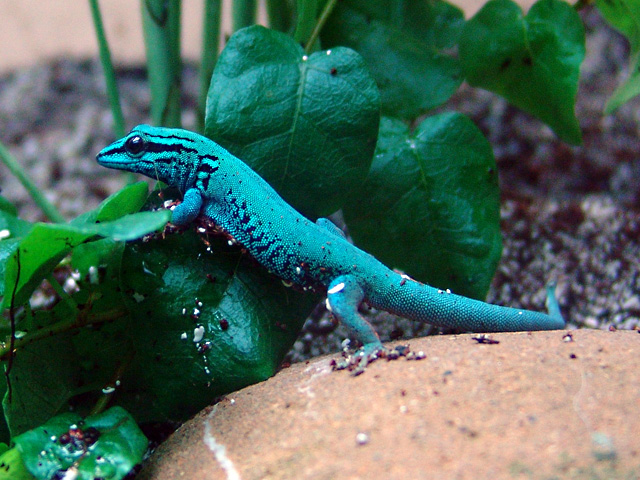 Lygodactylus williamsi, Männchen